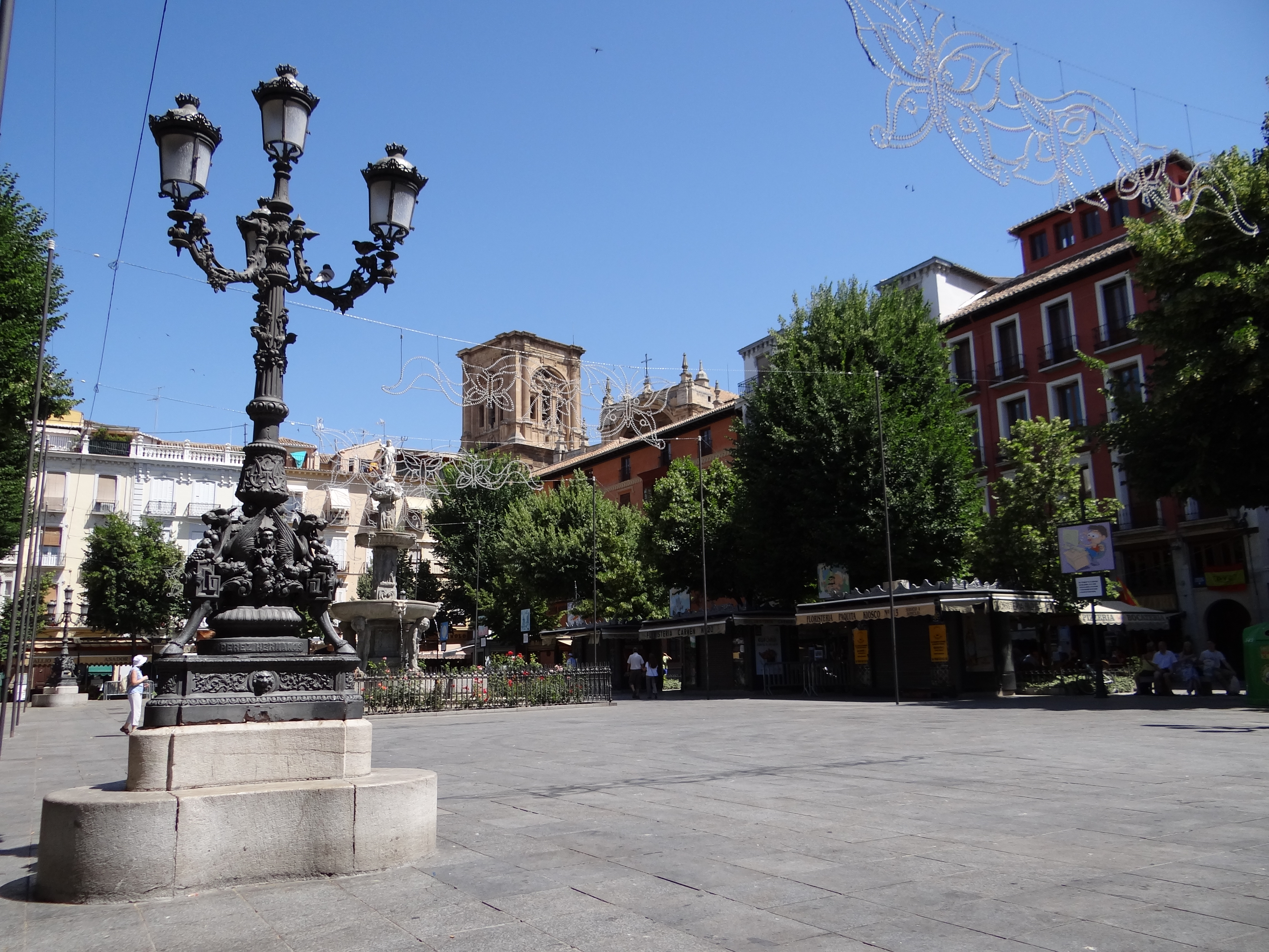 Vista de la plaza de Bib-Rambla en Granada (España).